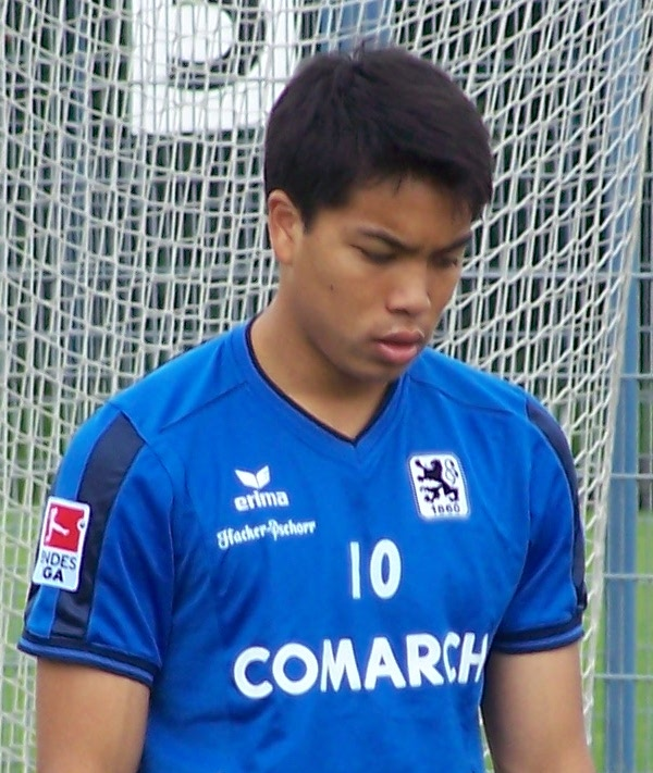 Bobby Wood, 1860 München, Training Grünwalder Straße